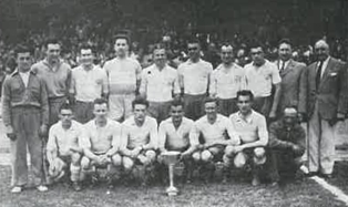 Équipe du Stade béthunois vainqueur du Championnat de France amateurs